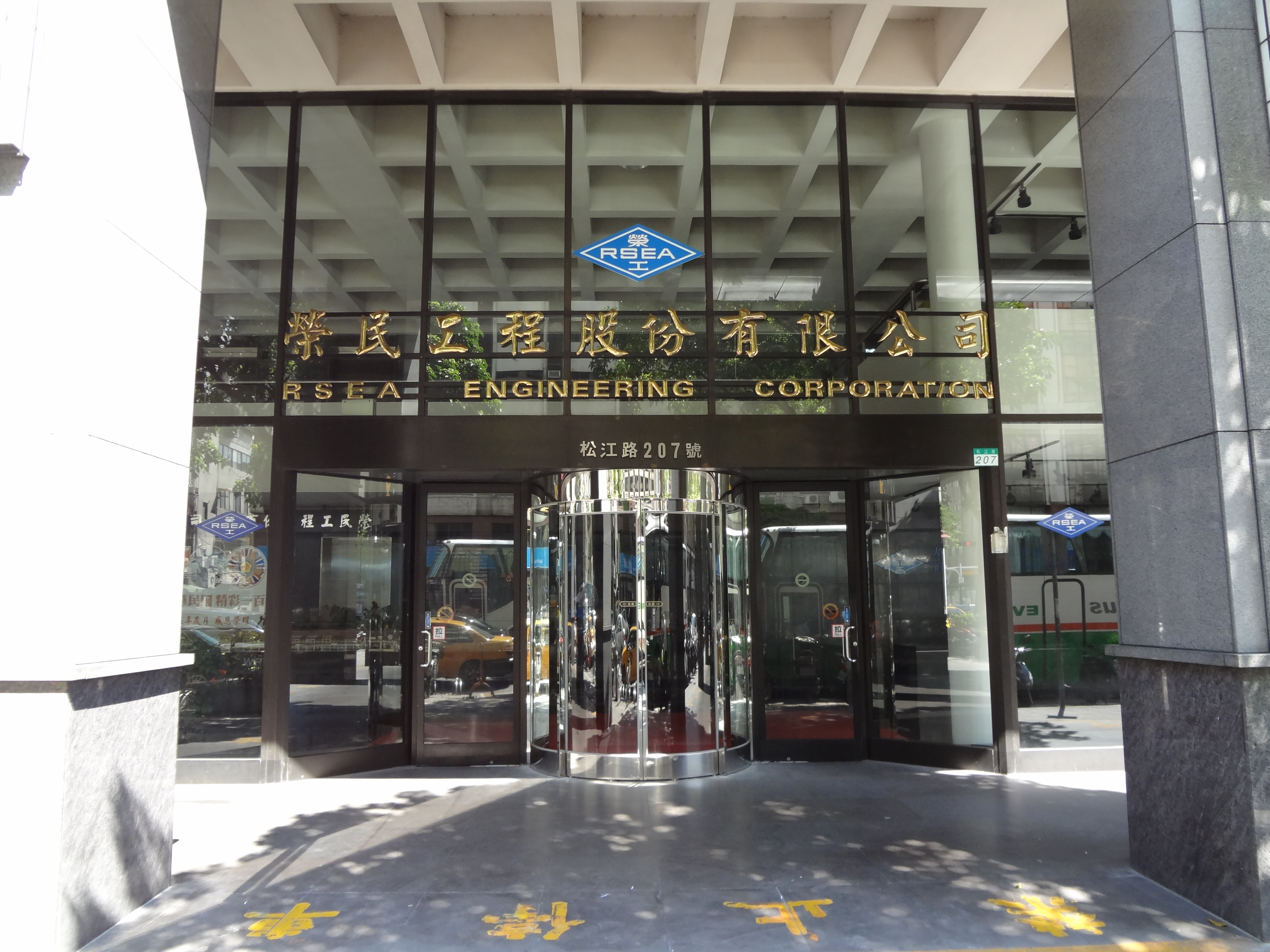 中文（台灣）: 志清大樓一樓的榮民工程公司總部大門，中央為自動門，左右兩側為手動門。